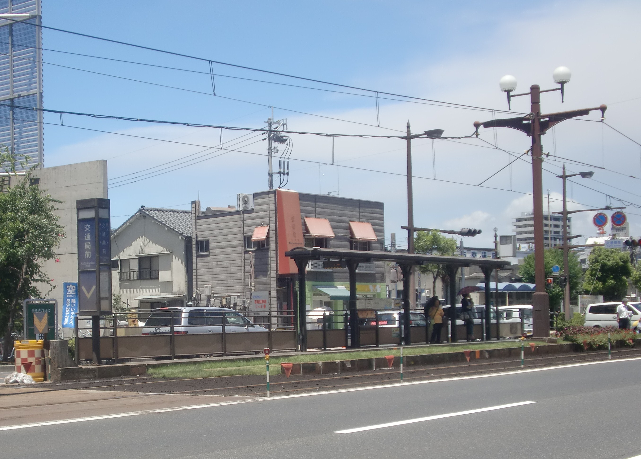 交通局前駅_(鹿児島県)の外観。